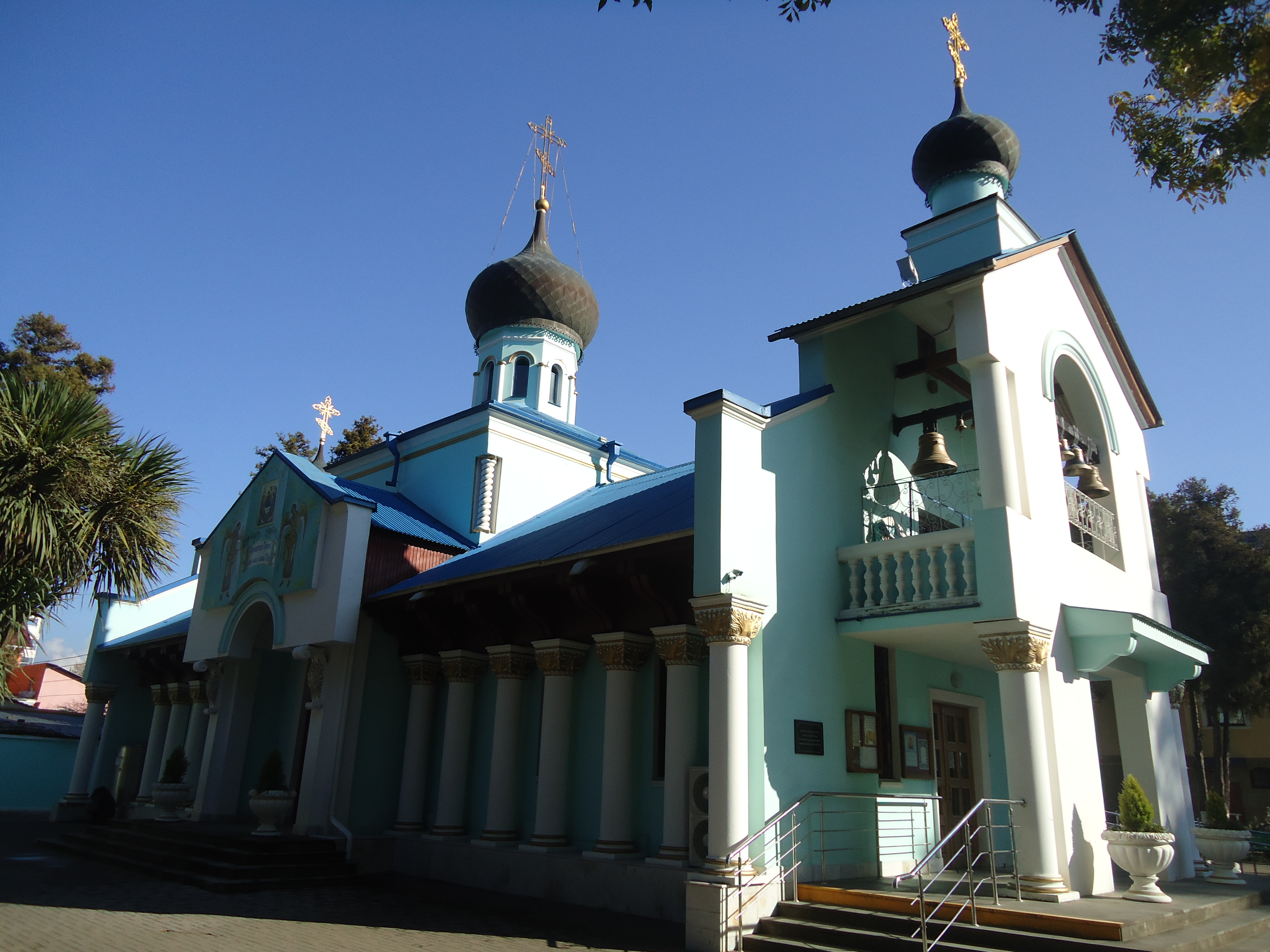 Храм Живоначальной Троицы в Адлере